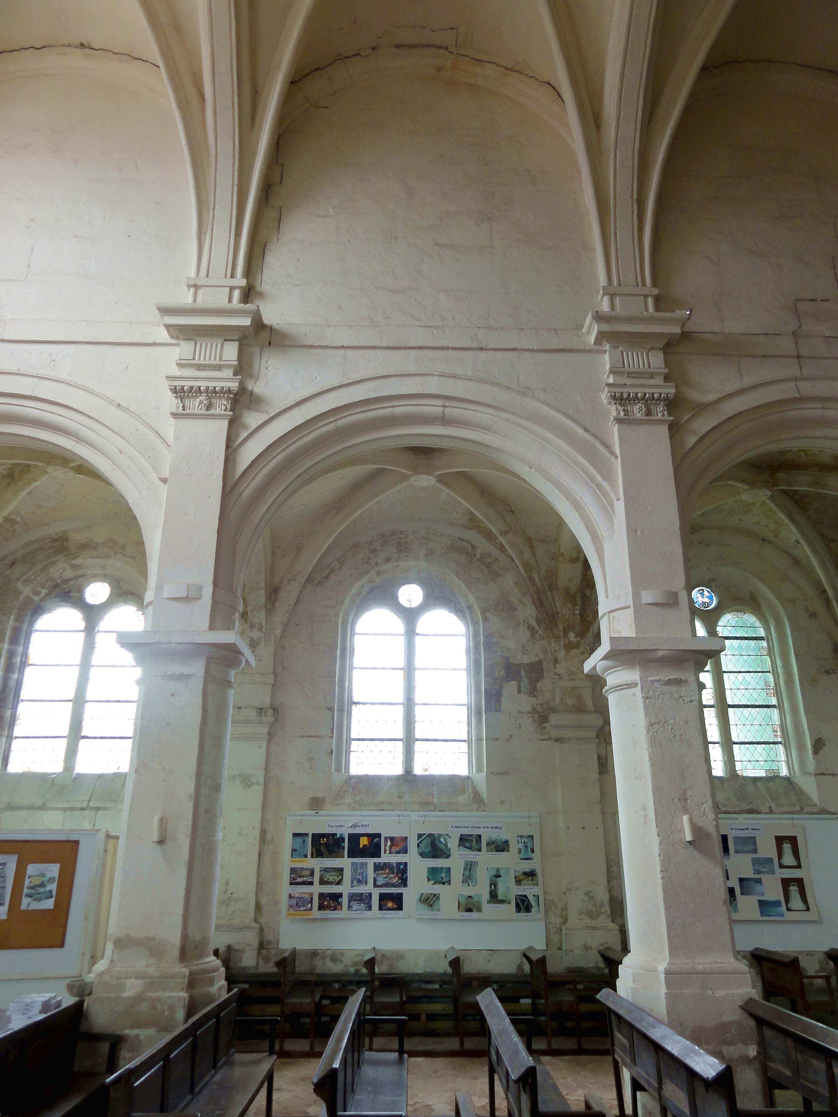 Intérieur de l'église (voir titre).